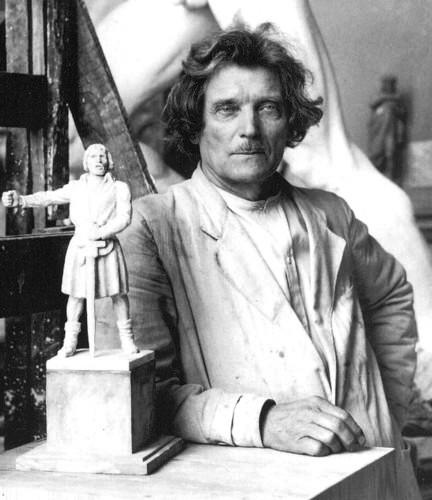 Carl Eldh 1935. Framför honom en modell av Engelbrekt Engelbrektsson till en tävling om en staty som sedan uppfördes utanför Heliga Trefaldighets kyrka i Arboga. Kommunen utlyste en tävling inför Riksdagens 500-årsjubileum 1935, där Eldhs förslag vann. Statyn utgör numera ett naturligt och omtyckt inslag i Arbogas stadsbild.